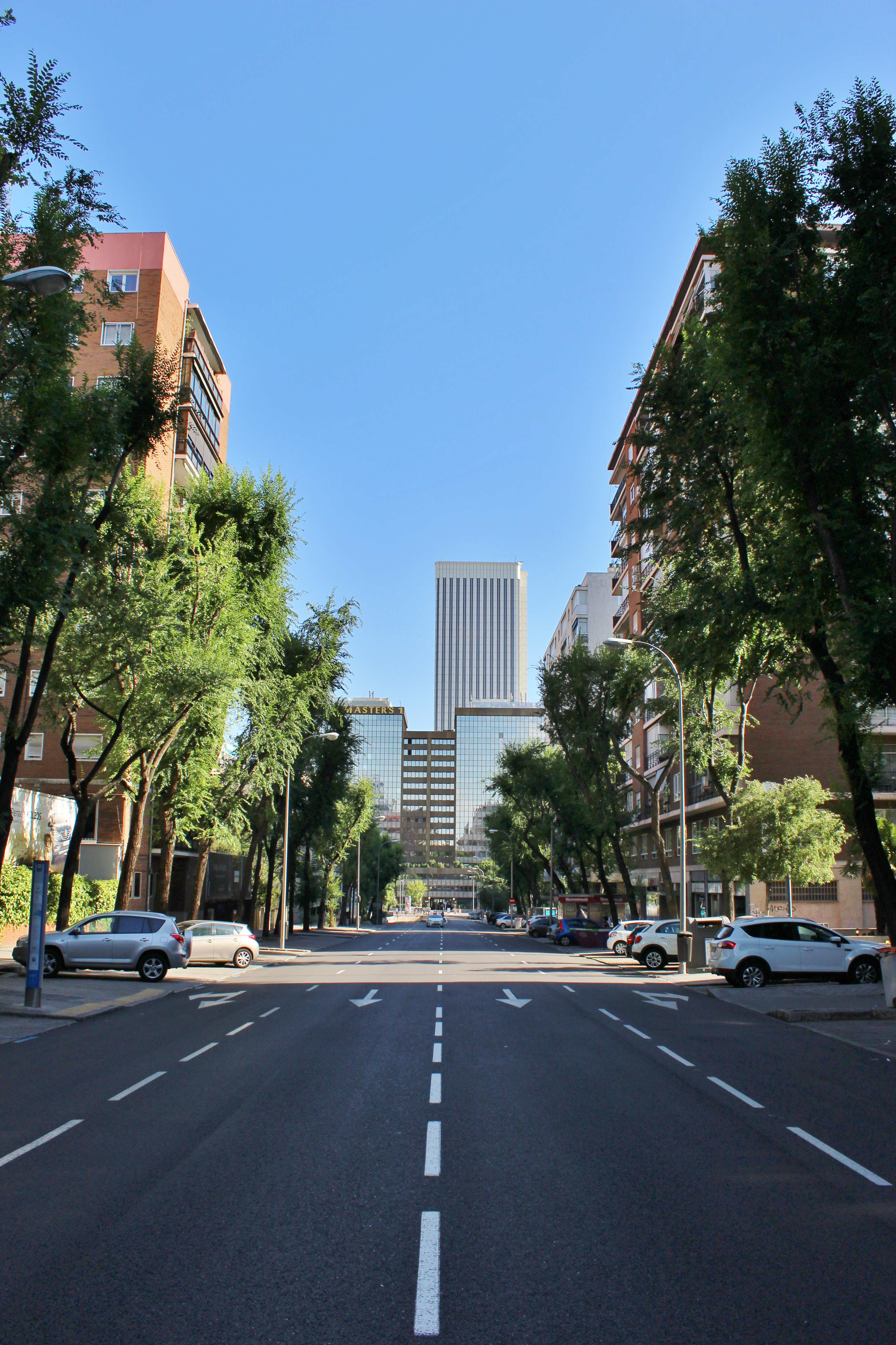 Calle del Poeta Joan Maragall, Madrid